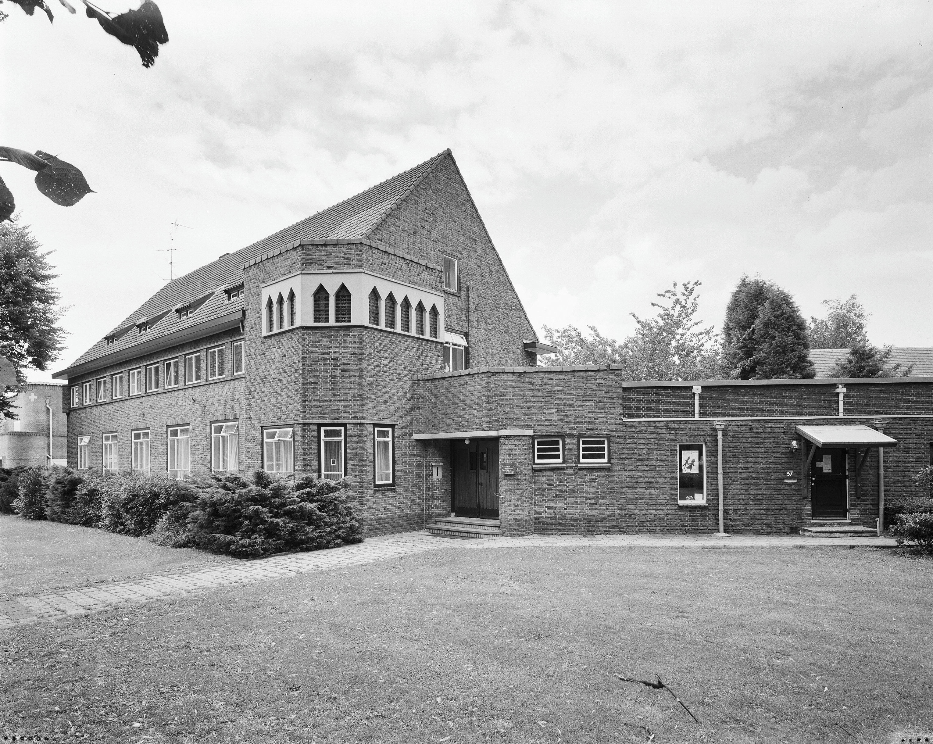 Rectoraatswoning Annex Klooster Van Paters Van Het Heilig Hart: Overzicht voorgevel en rechter zijgevel (opmerking: Gefotografeerd voor Monumenten In Nederland Limburg)